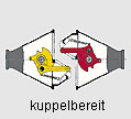 Kuppelbereite Schaku